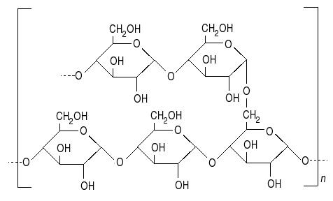 Présence de liaisons α(1→4) et de liaisons α(1→6)